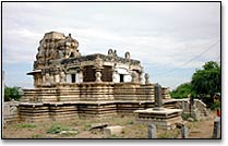 Pillalamarri Temple near Suryapet